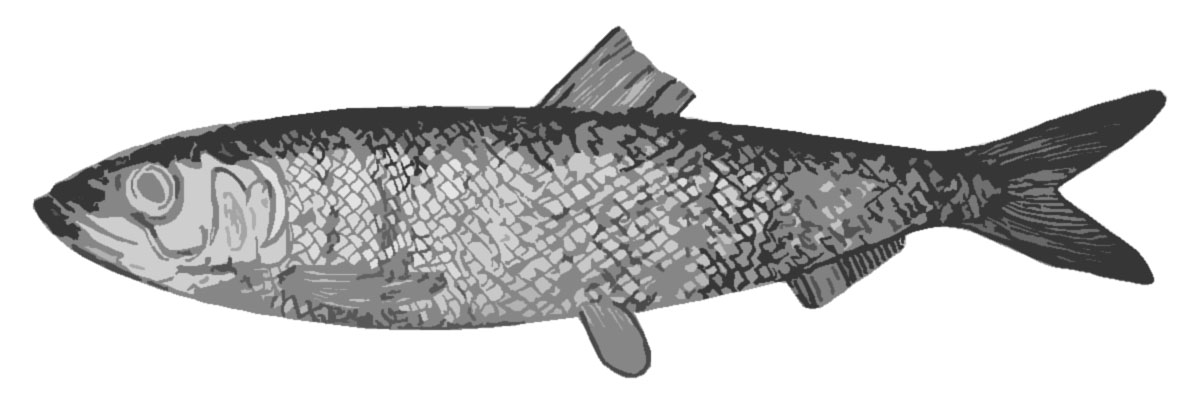 Silakka (Clupea harengus membras)